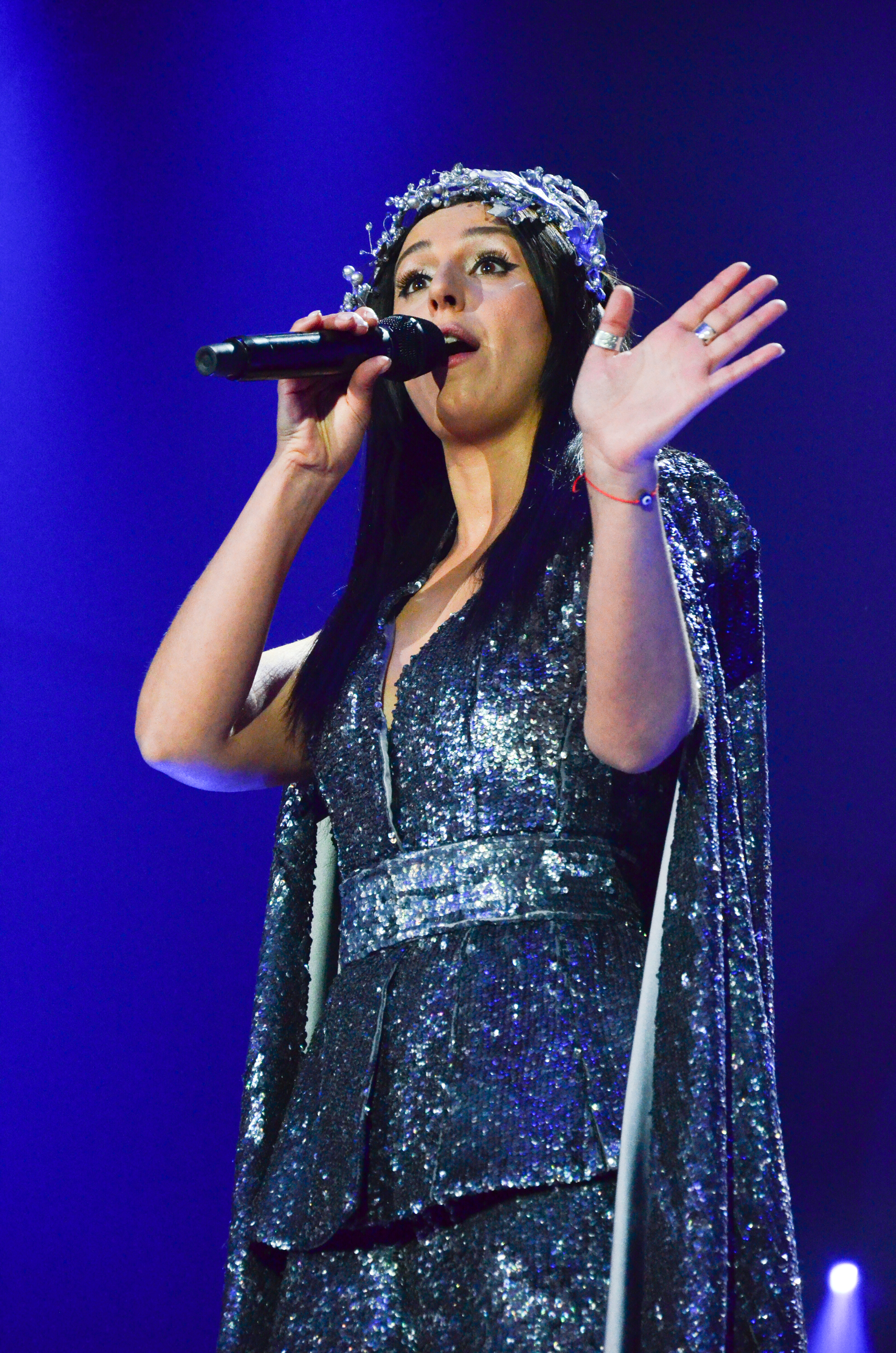 12 травня. Генеральна репетиція фіналу Євробачення 2017. Джамала.